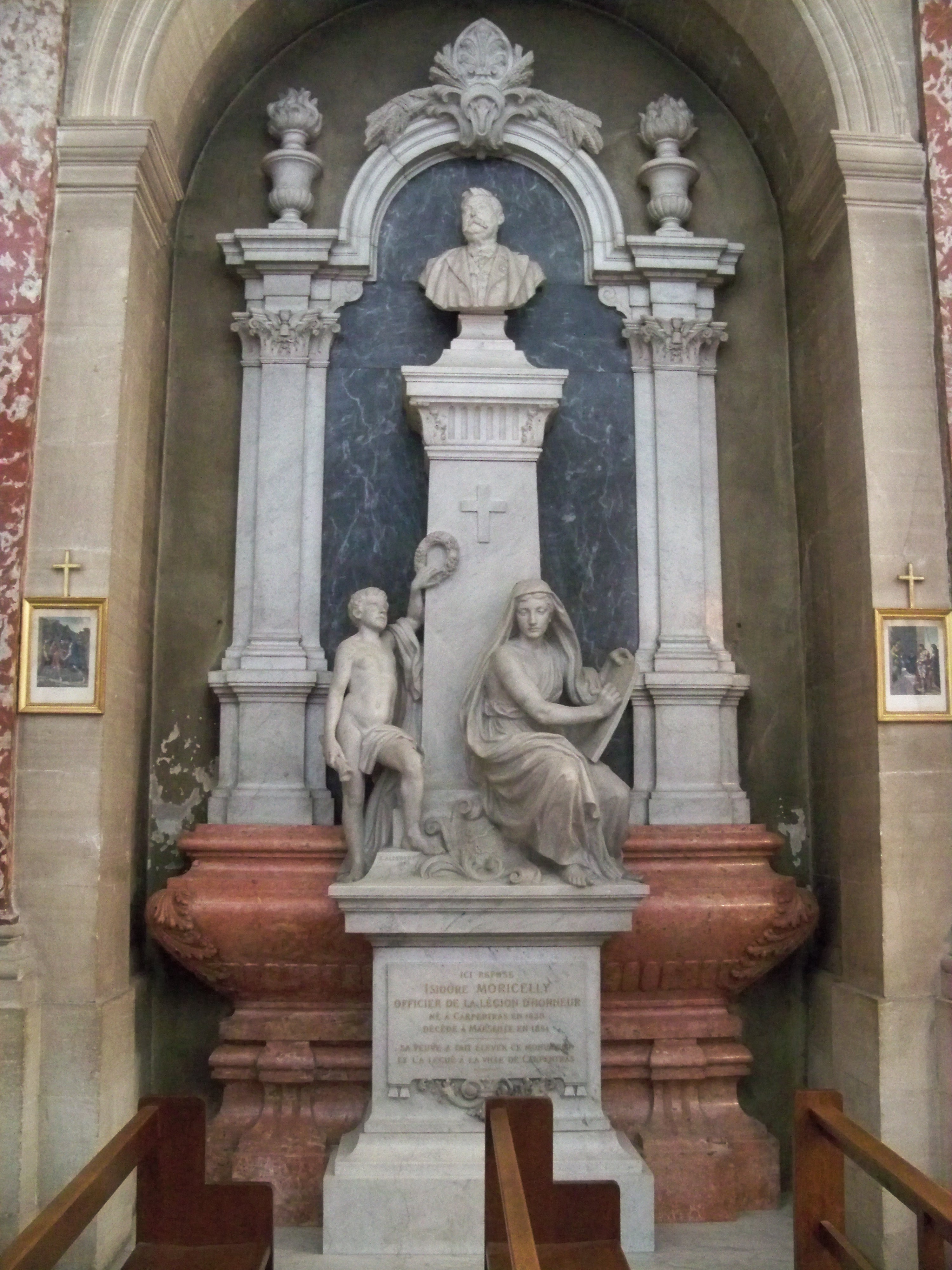 Tombeau d'Isidor Moricelli dans la chapelle de l'hotel dieu de Carpentras